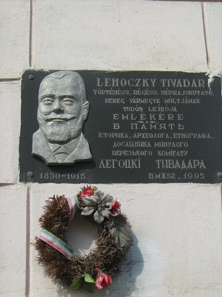 Памятная таблица историку, этнографу, основоположнику археологии и музейного дела в Закарпатье, краеведу - Тивадару Легоцкому в г.Берегово.